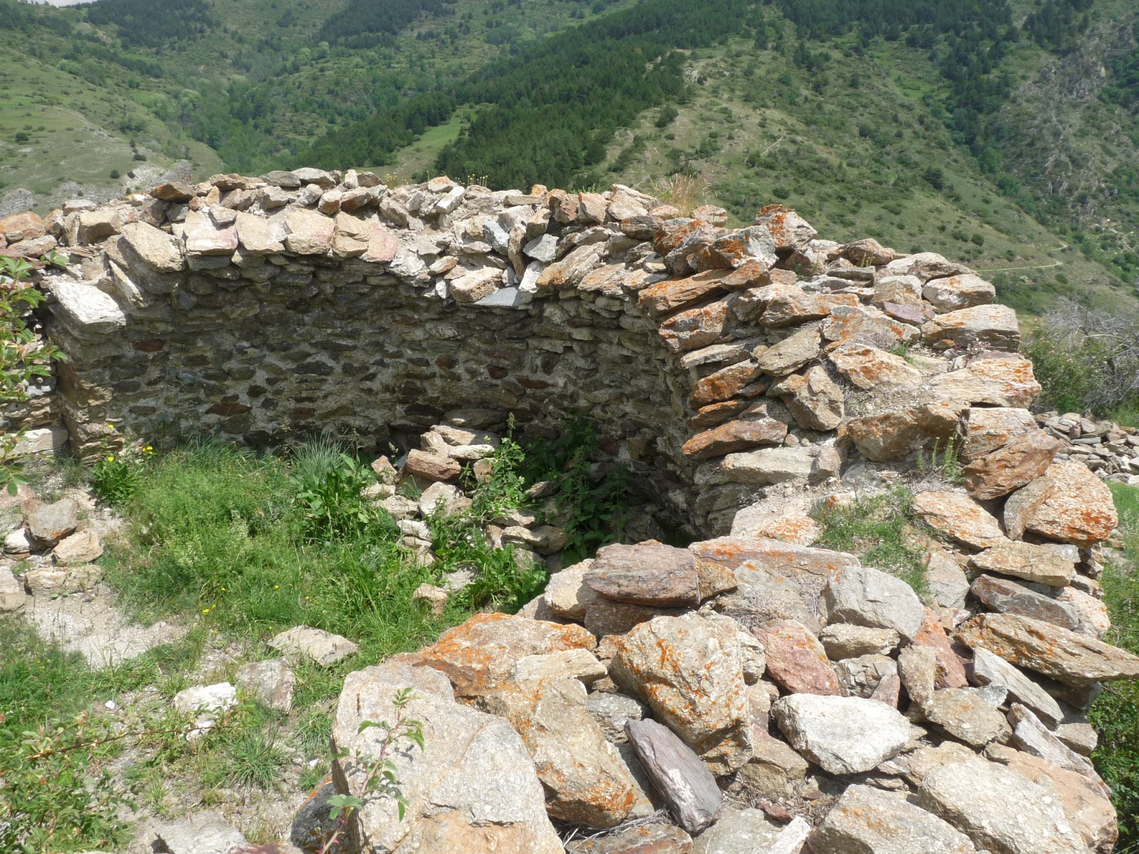 Chapelle St-Félix du Château, Llo, Pyrénées-Orientales, France